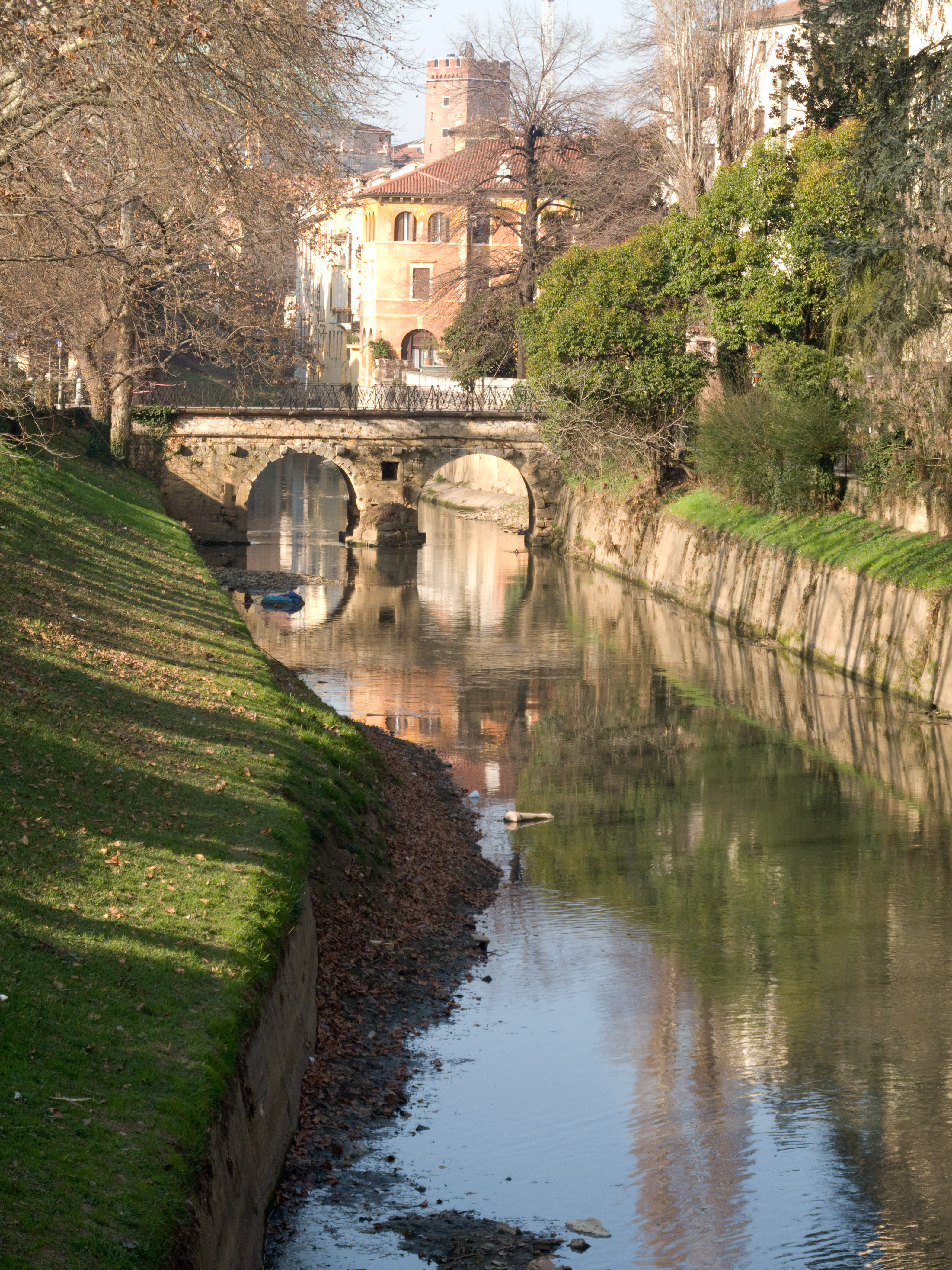 Ponte Furo (di origine romana) sul fiume Retrone